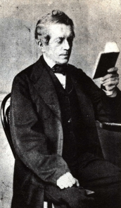 David Strauß - Bild vor 1874 erstellt und daher Public Domain 画像:David Friedrich Strauss.jpg